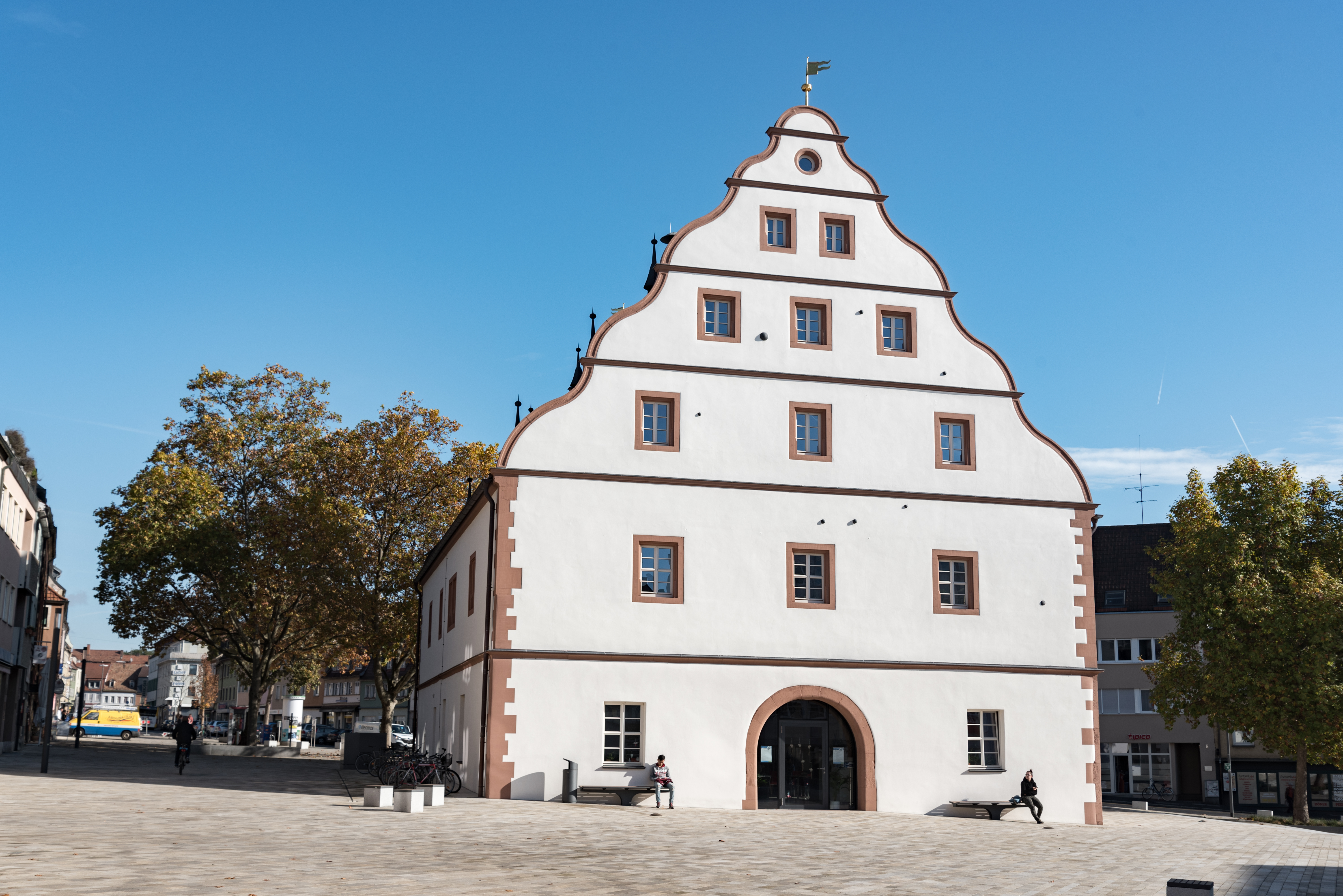 Schweinfurt, Zeughaus